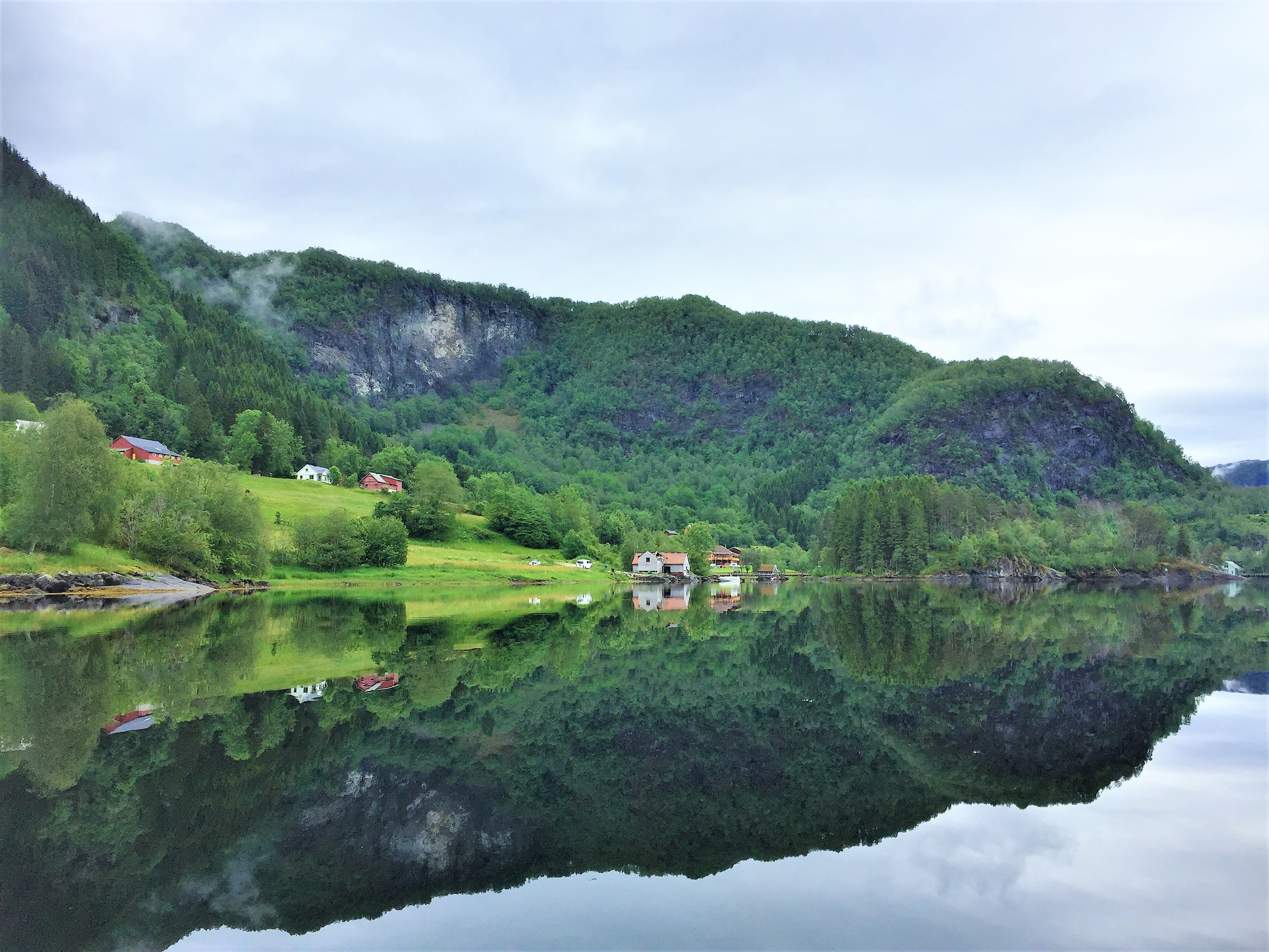 Flekkefjorden